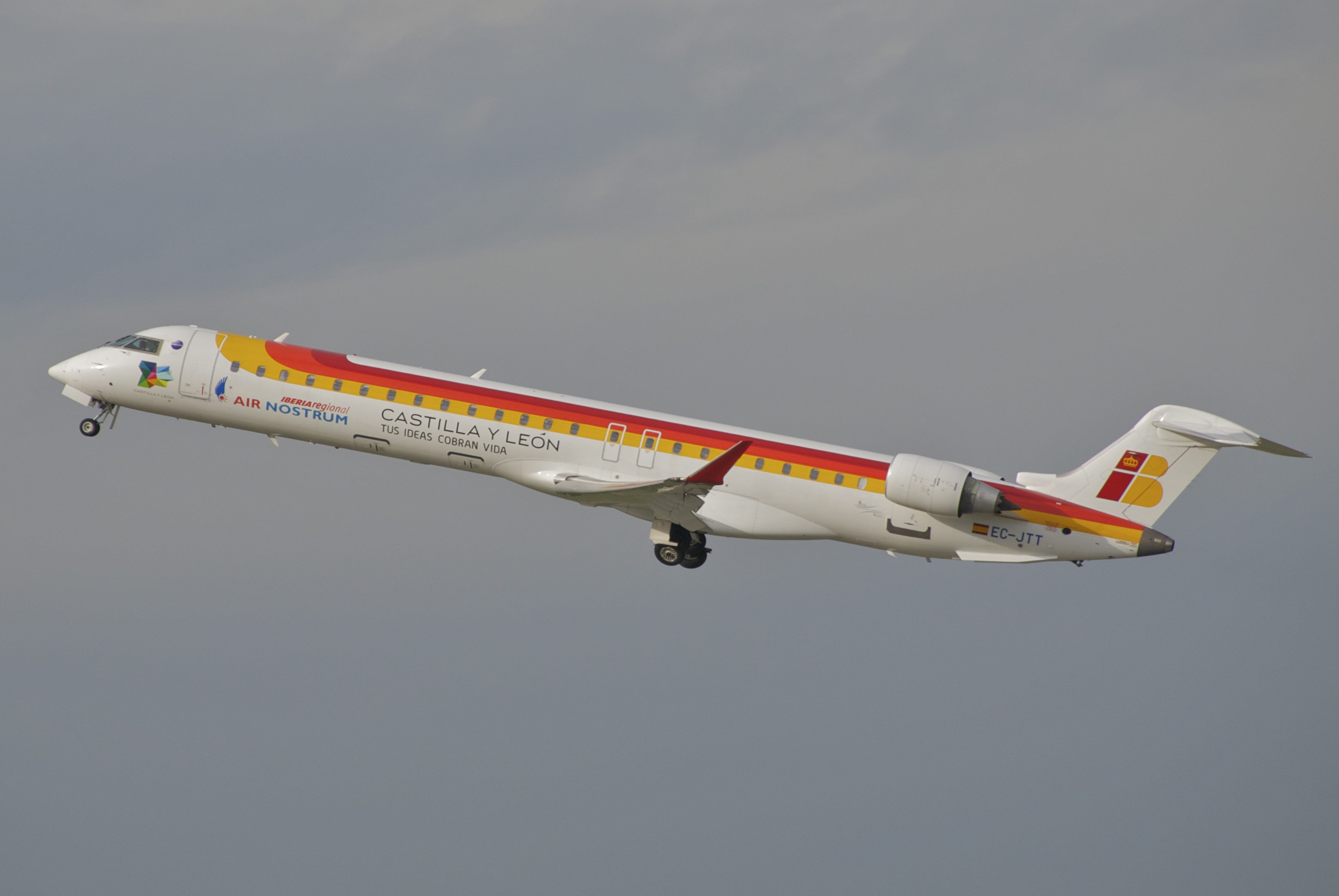 Air Nostrum Canadair CRJ900; EC-JTT@DUS;04.11.2012/678ap